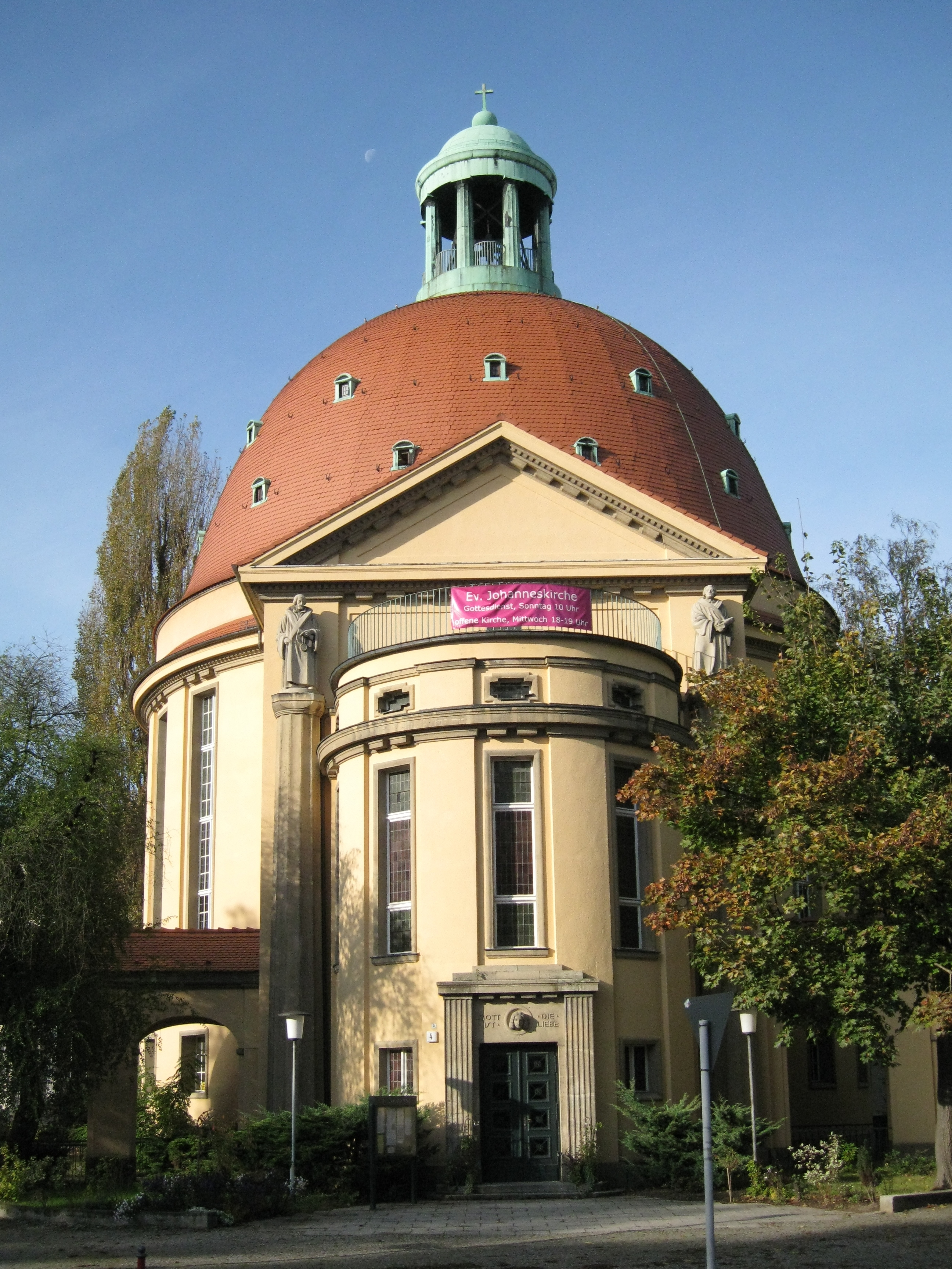 Johanneskirche mit Hauptportal